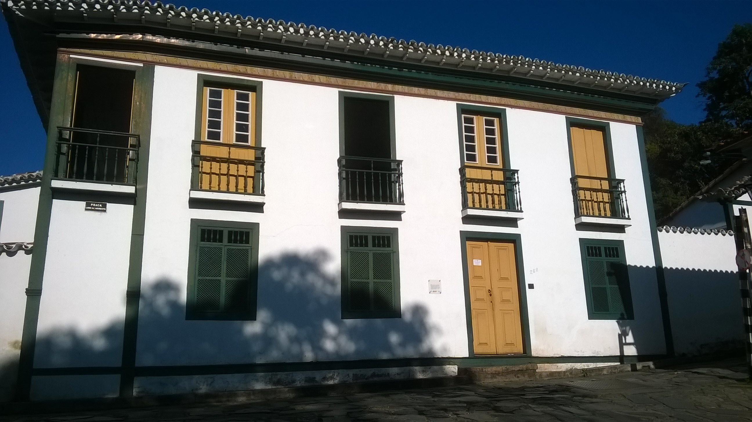 Casa da Chica da Silva - Rua Lalau Pires, 266